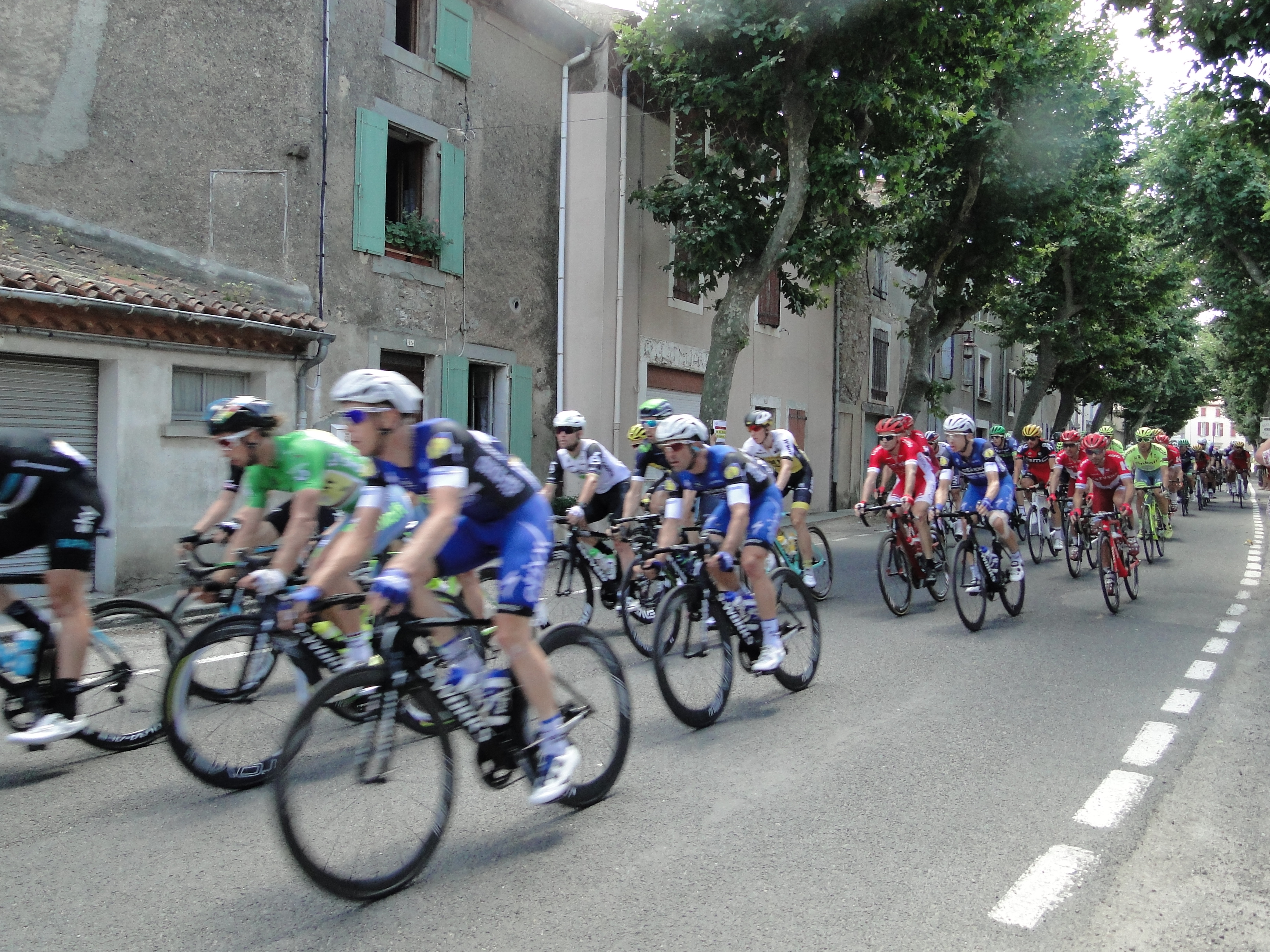 Passage de l'onzième étape du Tour de France à Caunes-Minervois (Aude) le 13 juillet 2016 - passage des coureurs